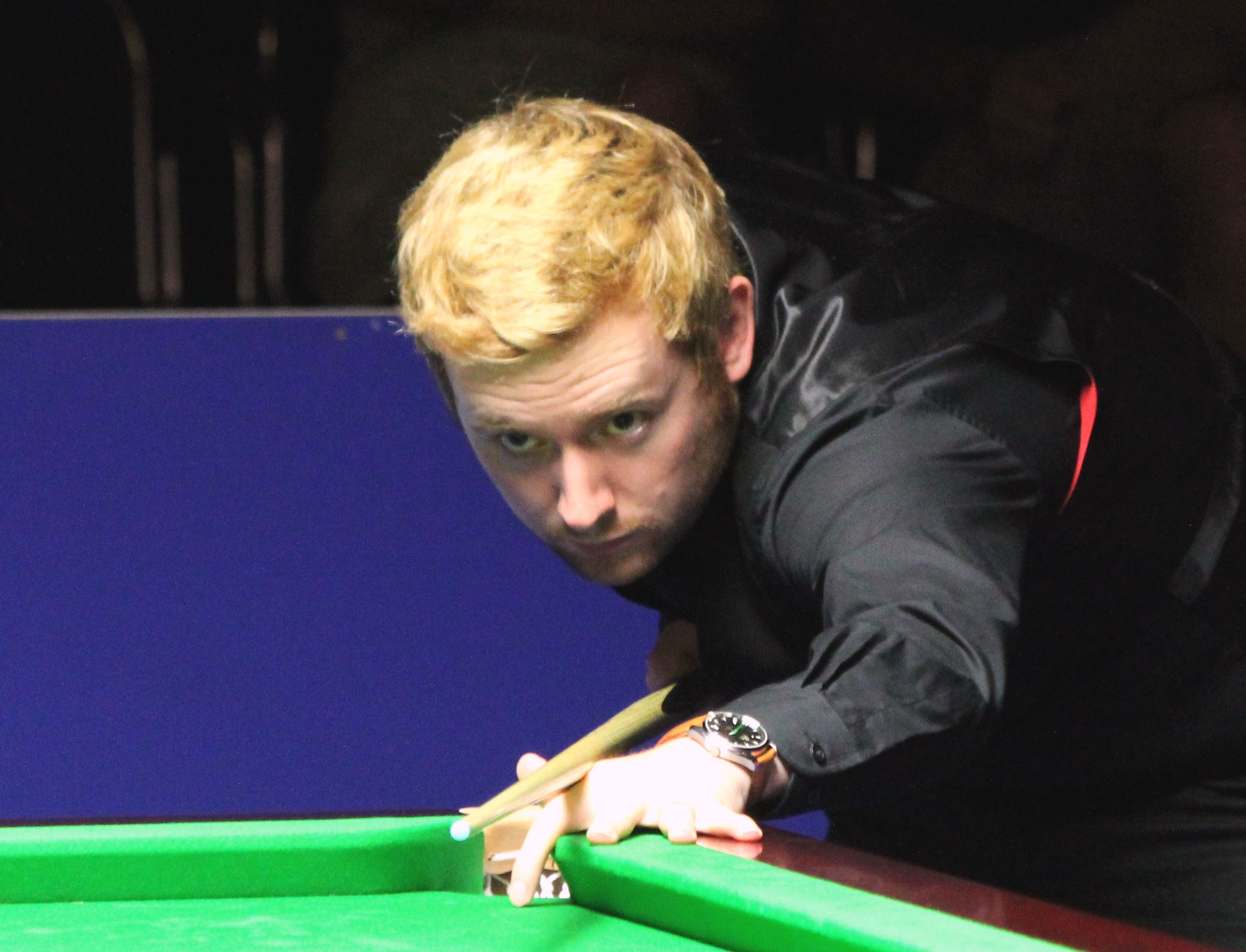 Ben Woollaston beim Paul Hunter Classic 2016